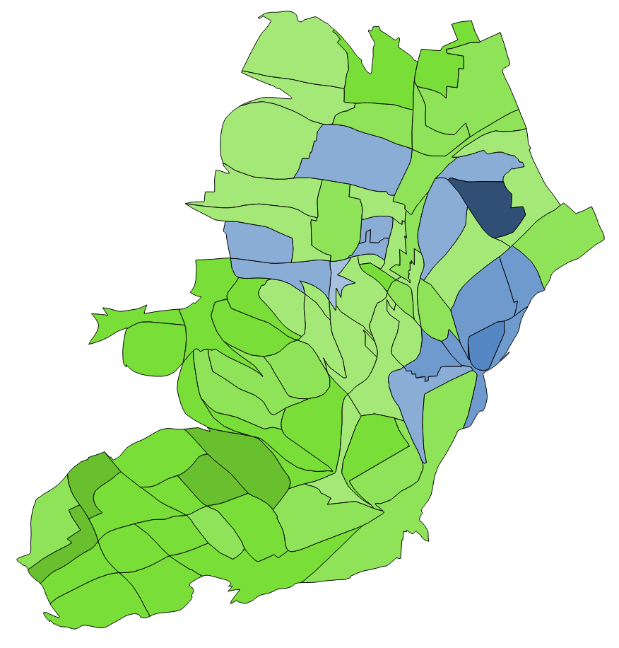 中文（台灣）: 顏色對照表